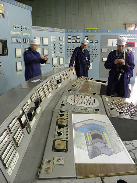 no original description